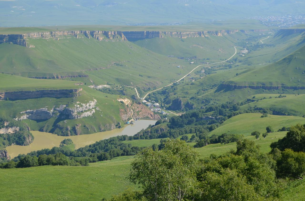 Экскурсия на Бермамыт, 2.07.2019. Вид с горы Шапка на Эшкаконскую ГЭС